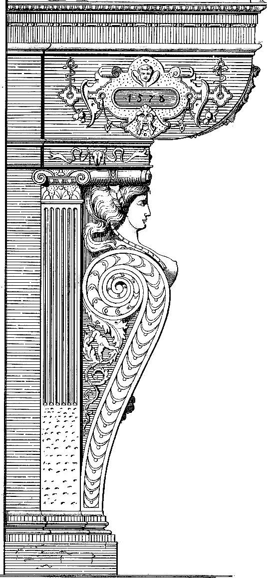 Zeichnung eines relief-verzierten Sandsteinkamins auf Schloss Hugenpoet in Essen-Kettwig